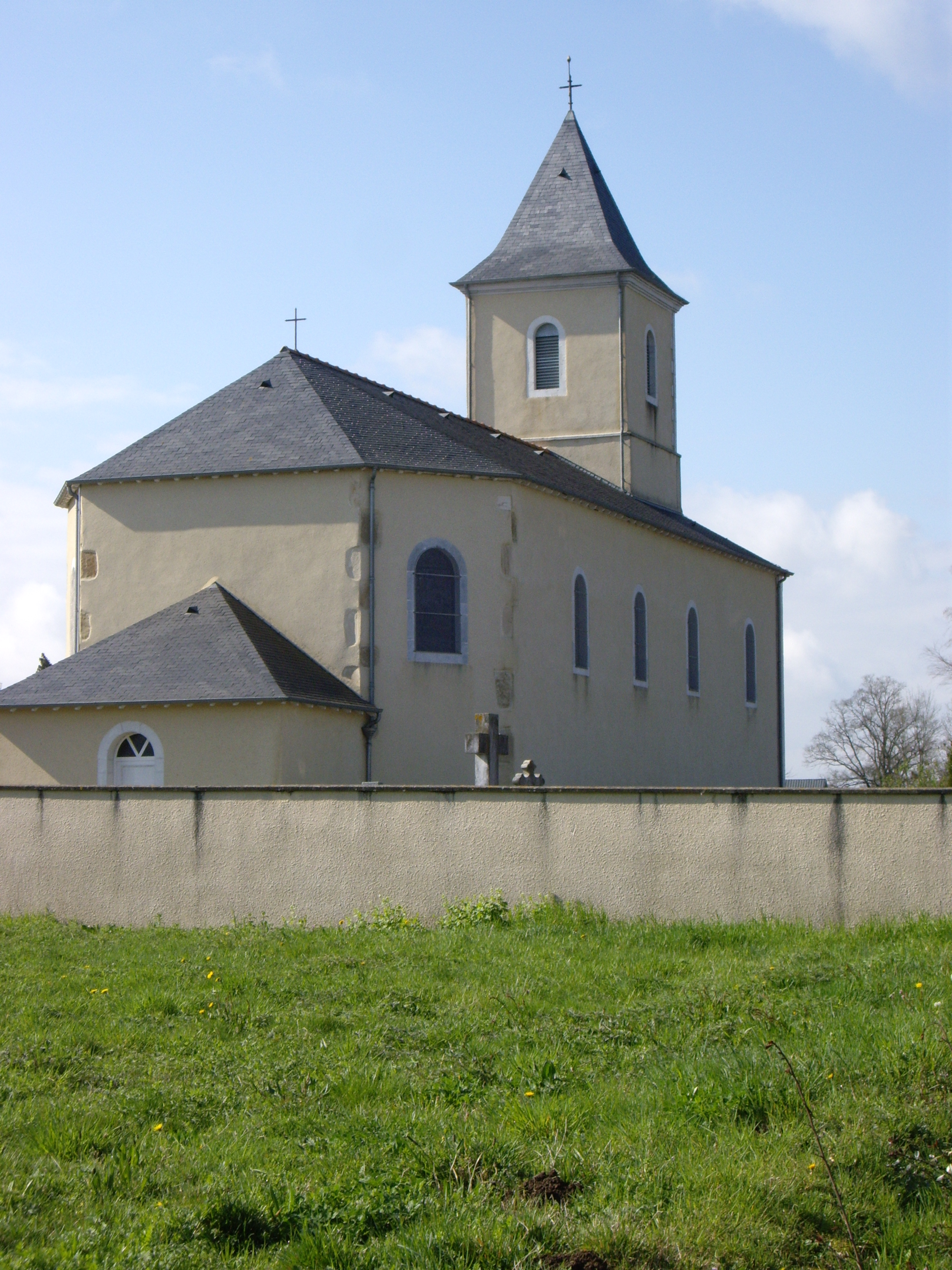 Église de l’Assomption de Limendous (64)